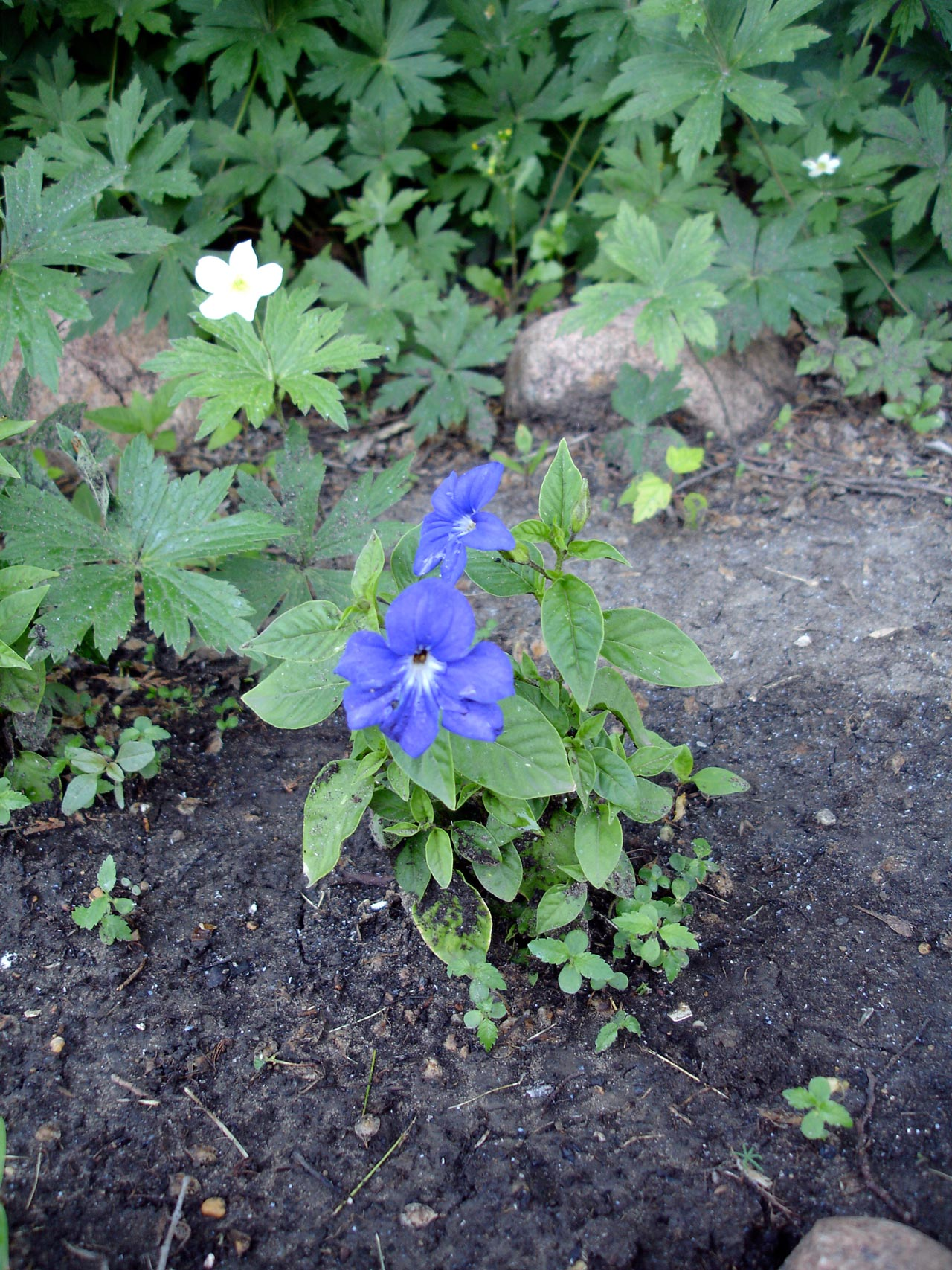 Browallia speciosa in cultivation